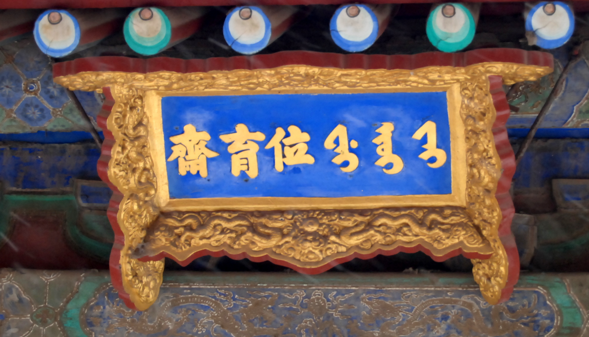 中文（中国大陆）: 位育斋，故宫